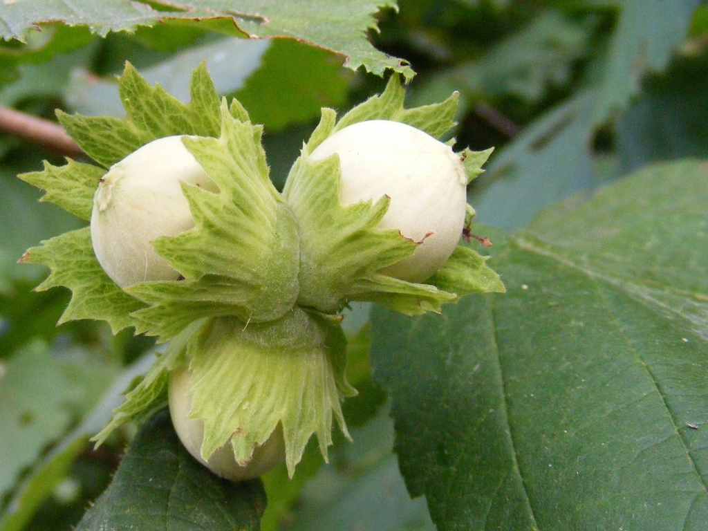 noisette